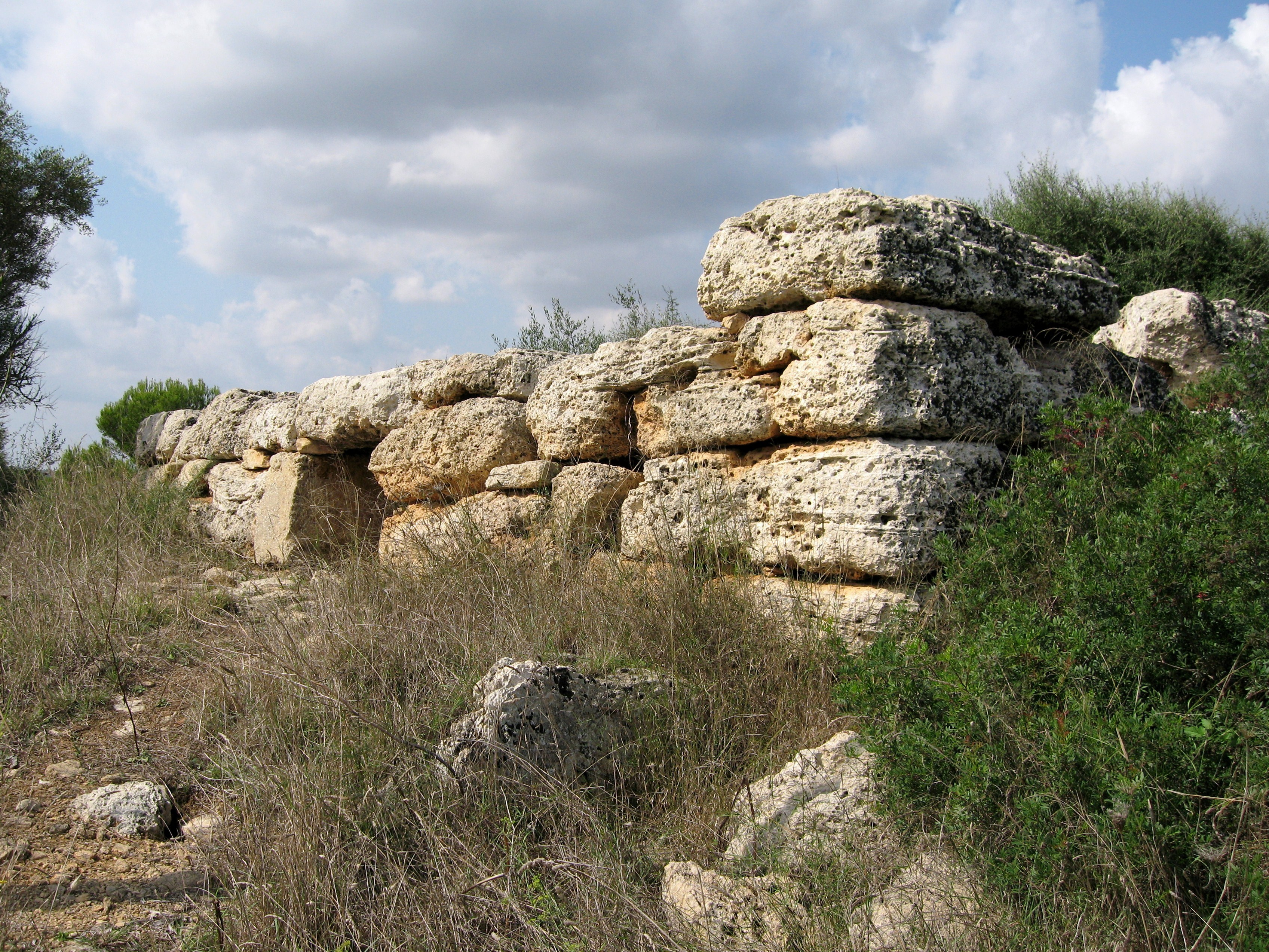 Talaiot de sa Cova de sa Nineta am Abzweig der Straße Richtung Son Serra de Marina, Mallorca, Spanien